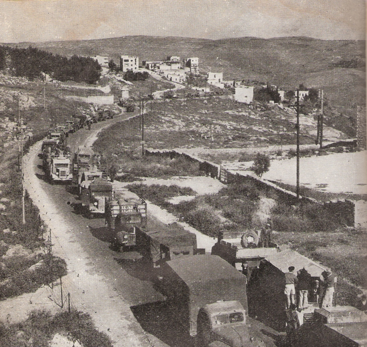 שיירת אספקה מהשפלה פורצת את המצור ונכנסת לירושלים במלחמת העצמאות, 1948